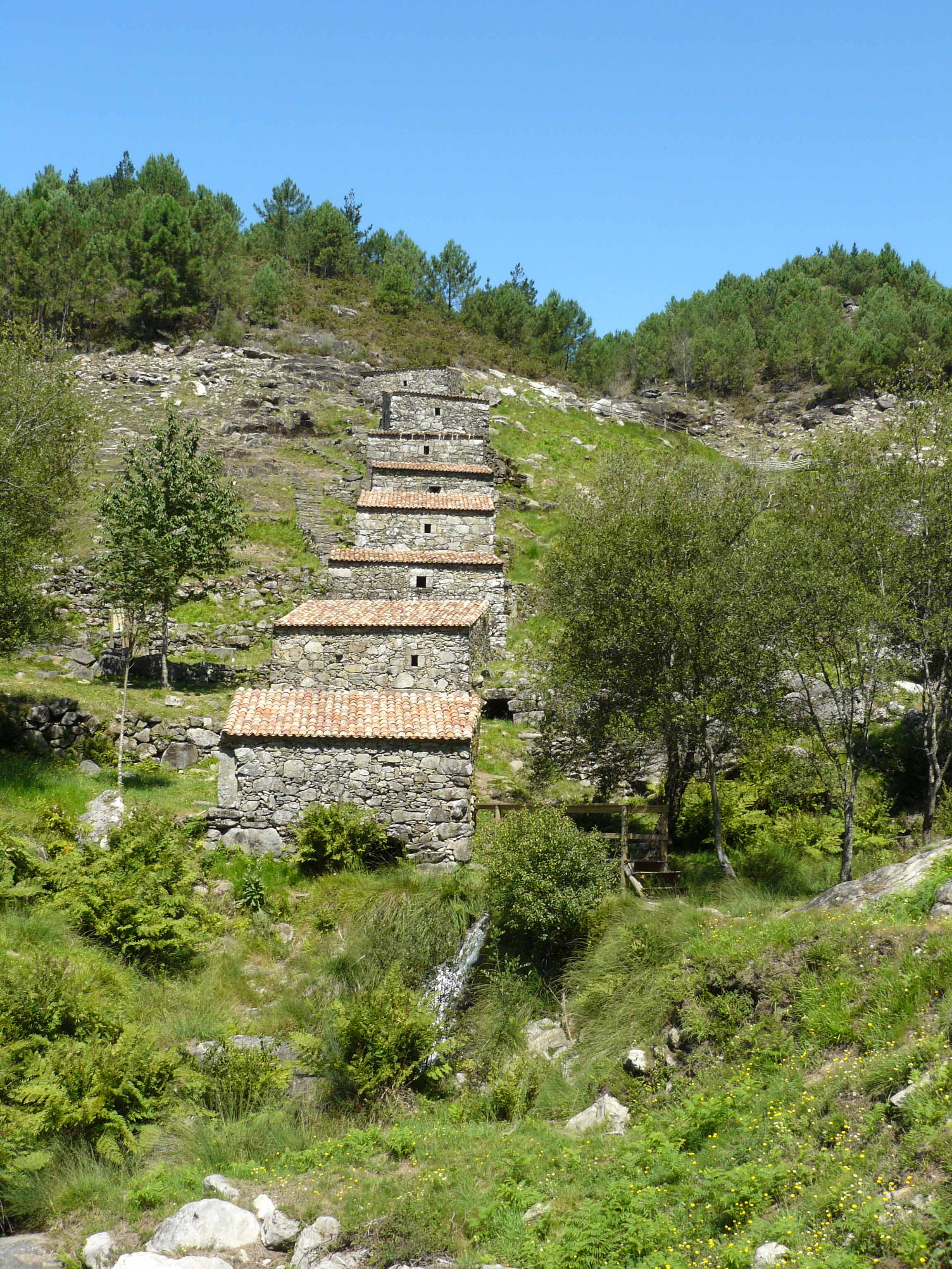 Vista xeral dos Muíños do Folón